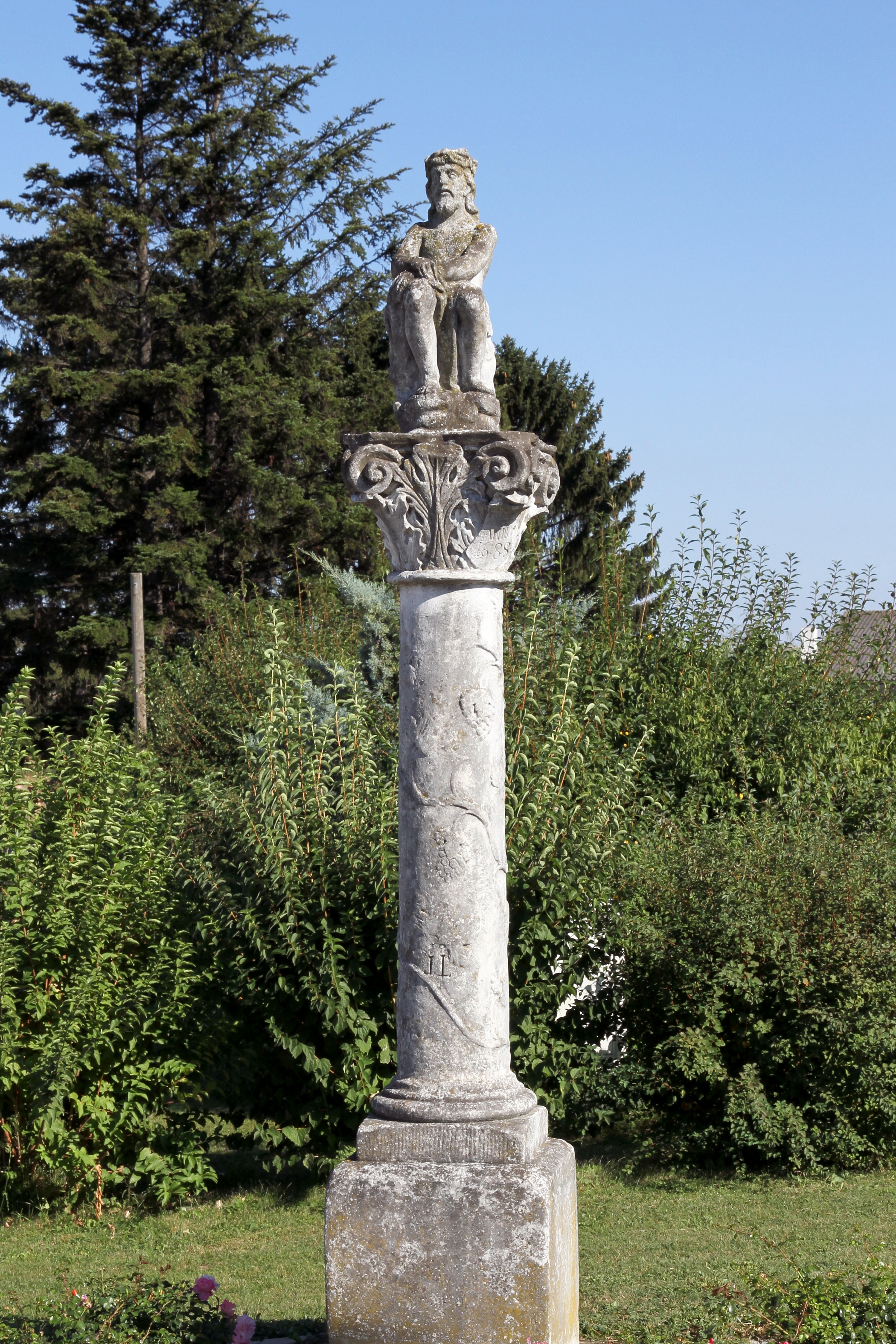 Eine Ecce-homo-Steinfigur auf einer Weinlaubsäule aus dem Jahr 1688 am südöstlichen Ortsausgang der burgenländischen Gemeinde Unterfrauenhaid.